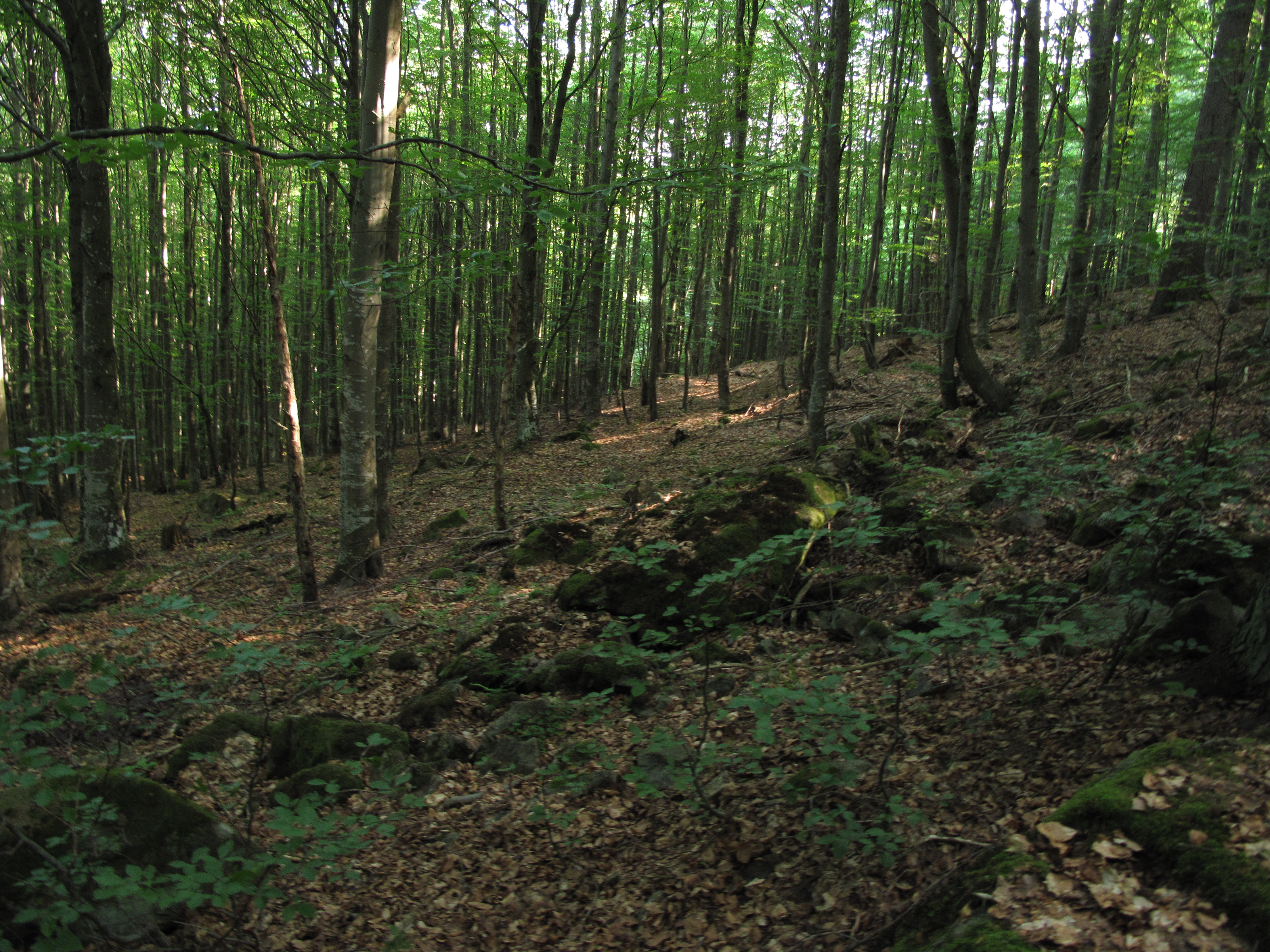 Přírodní rezervace Zátoňská hora. Okres Prachatice, Česká republika.